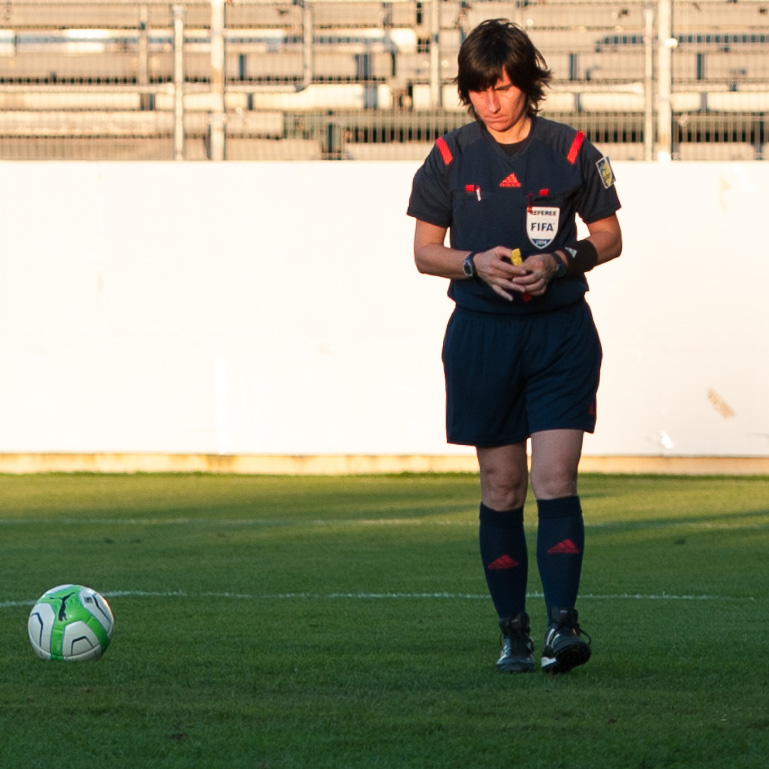 Fußball FIFA Women's World Cup 2015 Qualifying Round Österreich gegen Kasachstan Pasching, 17. September 2014